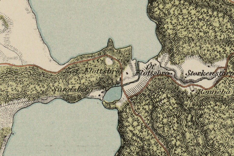 Flottsbronäset med Flottsbrokanalen (innan uträtningen)